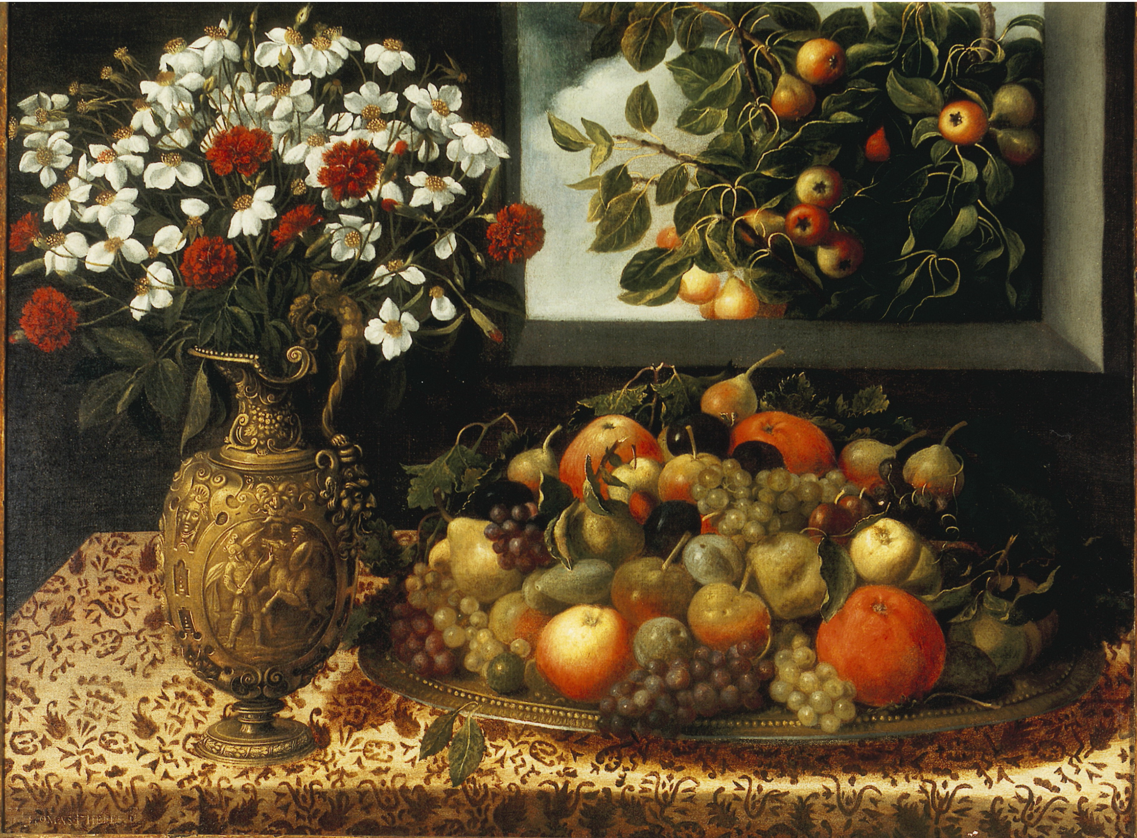 Thomas Yepes, Naturaleza muerta, c. 1640